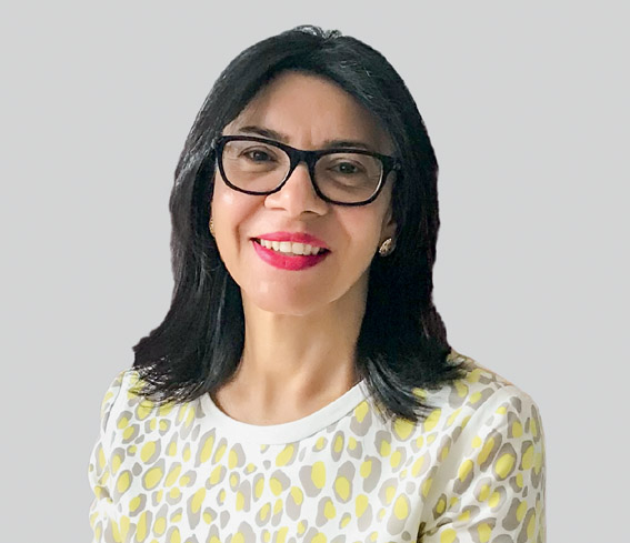 Jornalista e escritora Isa Colli